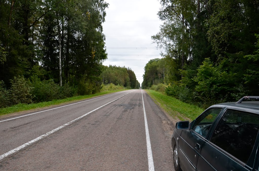 Luganda: Дорога в Малиновое Озеро